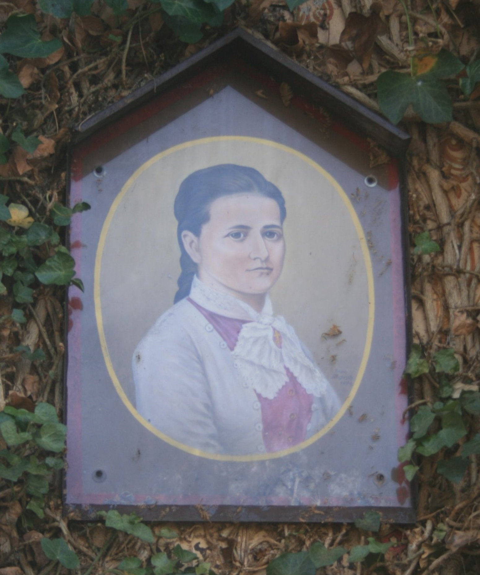 Aennchen Schumacher, Lindenwirtin, Bonn-Bad Godesberg, Portrait an Hauswand ihres Gasthauses in Godesberg